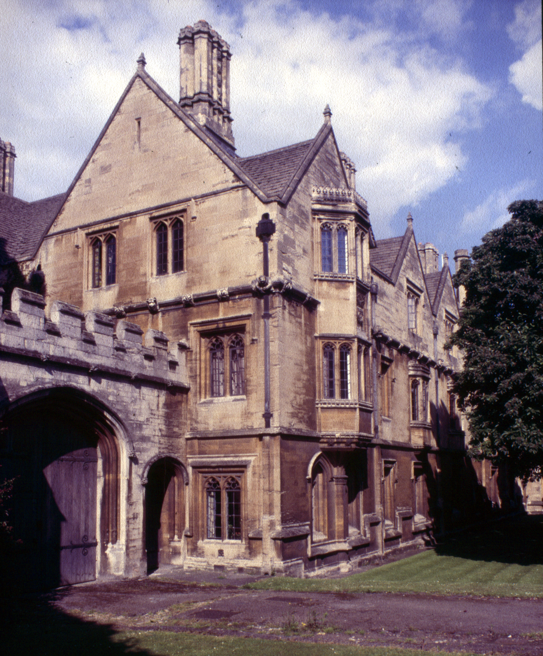 1985 in Oxford